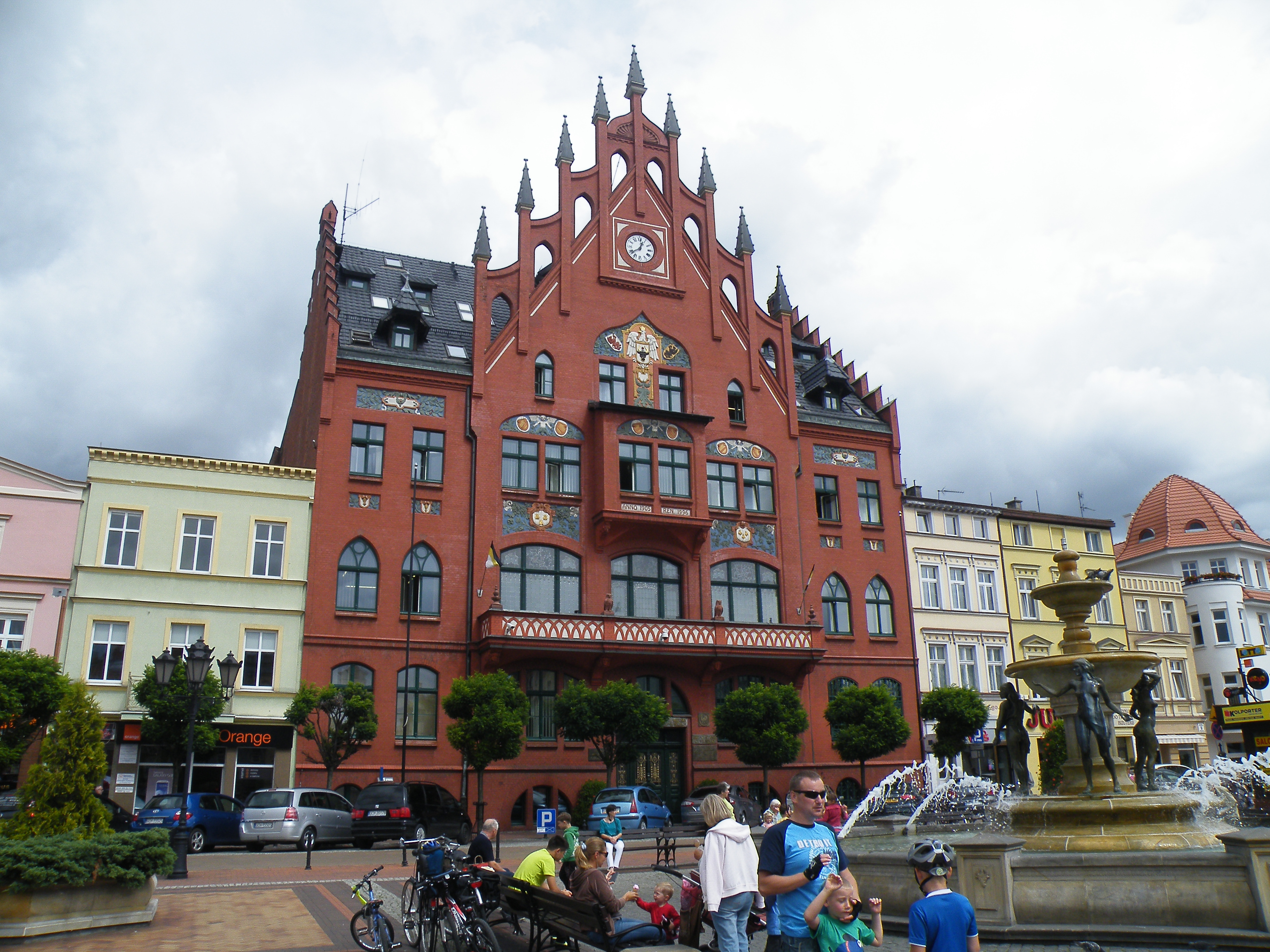 Chojnice, Stary Rynek 1 - ratusz, 1902